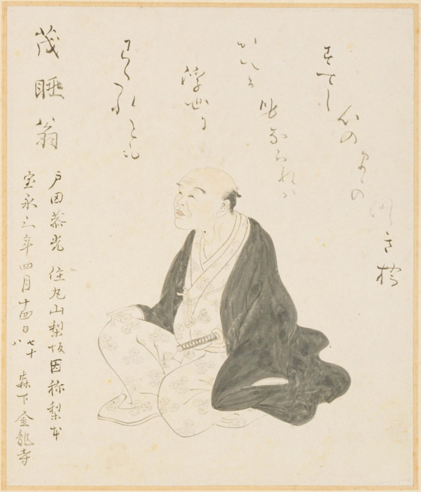 『肖像集』 戸田茂睡（1629-1706）